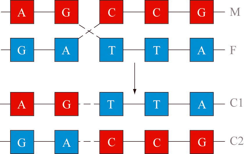 Схема генетической рекомбинации: рекомбинация происходит в результате физического разрыва в хромосомах (M) и (F) и их последующего соединения с образованием двух новых хромосом (C1 и C2).